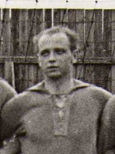 Ragnar "Raggen" Lennartsson i Fritsla IF:s A-lag. Bilden tagen i mitten av 1930-talet.